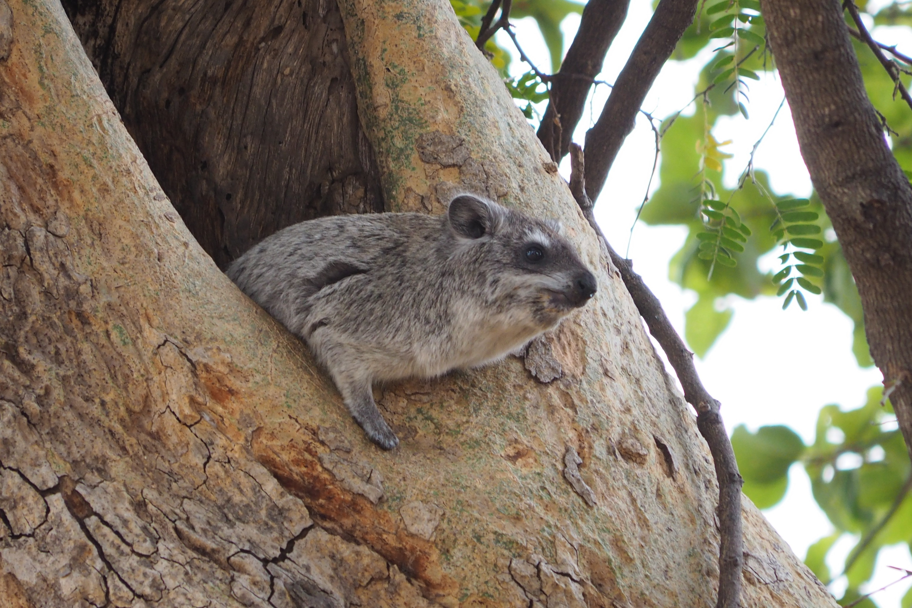 Steppenwald-Baumschliefer (Dendrohyrax arboreus)